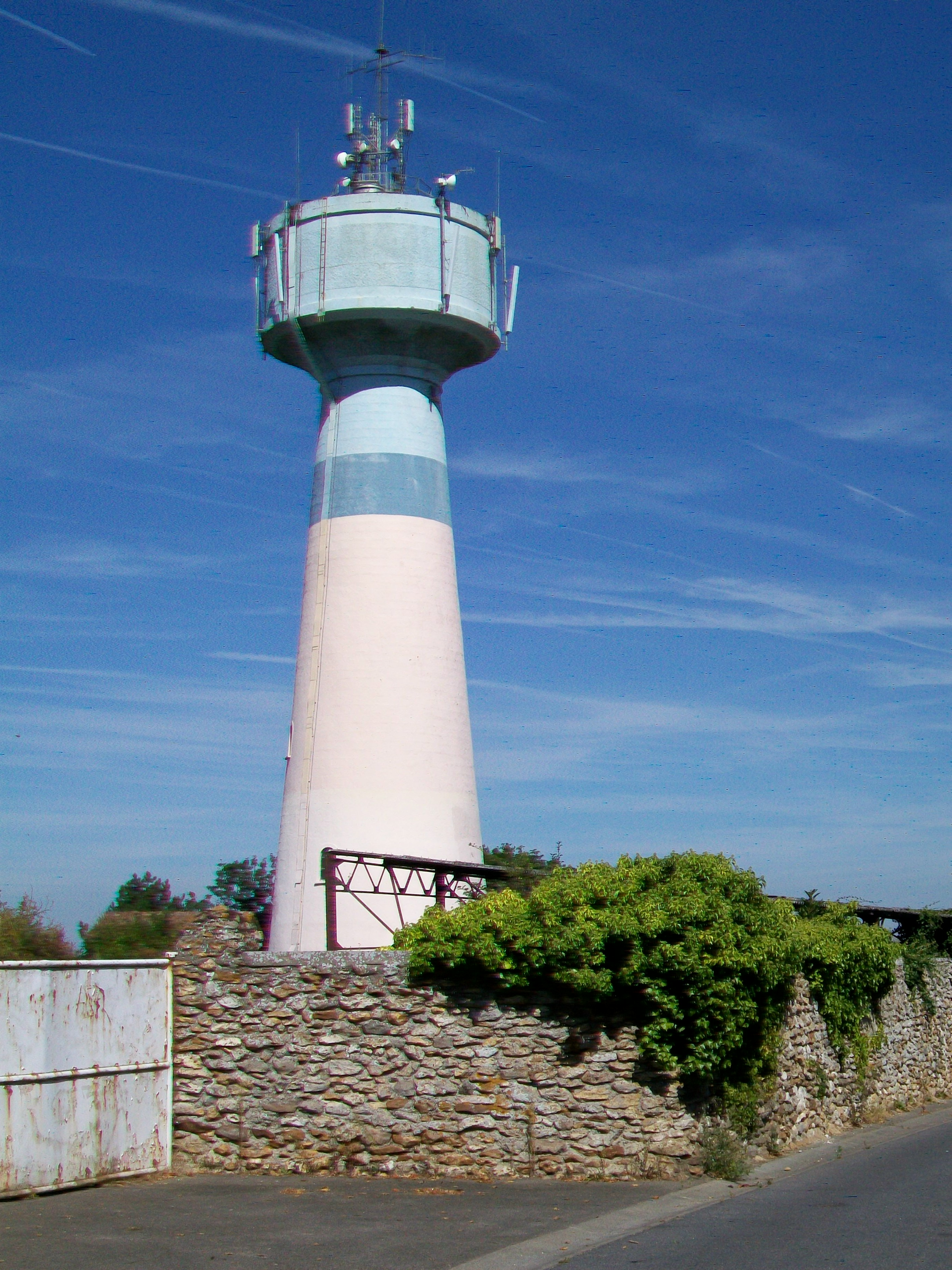 Le château d'eau au vieux village.